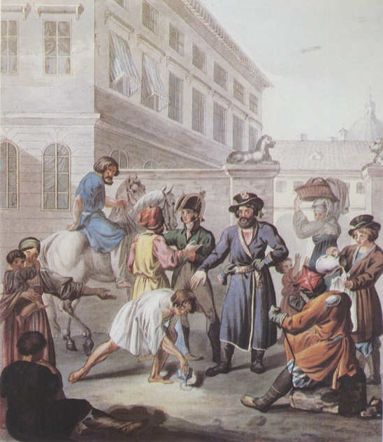 Санкт-Петербург. Уличная сцена. Игра в свайку. Из папки "Историческая панорама Санкт-Петербурга и его окрестностей", начало XIX века